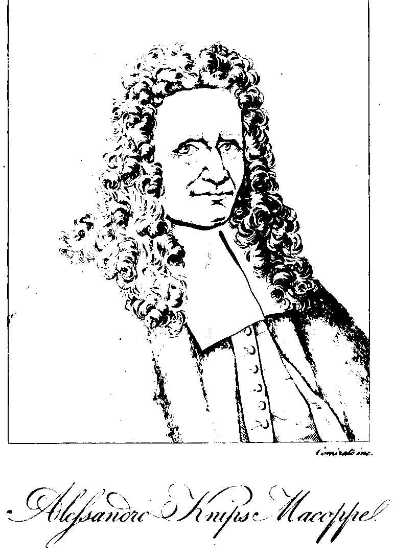 Alexander Knips Macoppe